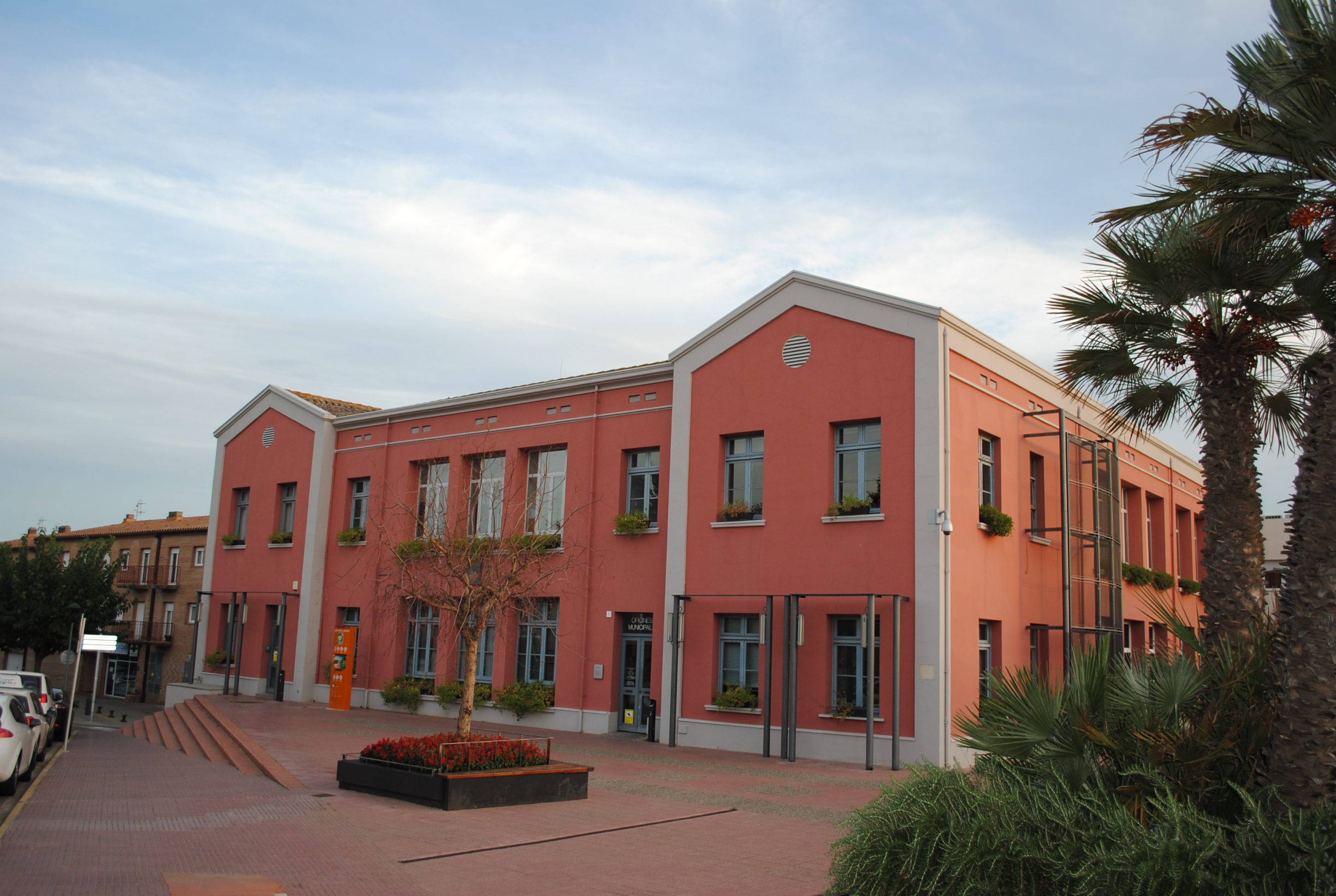 Edifici de l'ajuntament de Calonge, que abans havien estat les escoles públiques i abans, escoles dels Germans de La Salle.